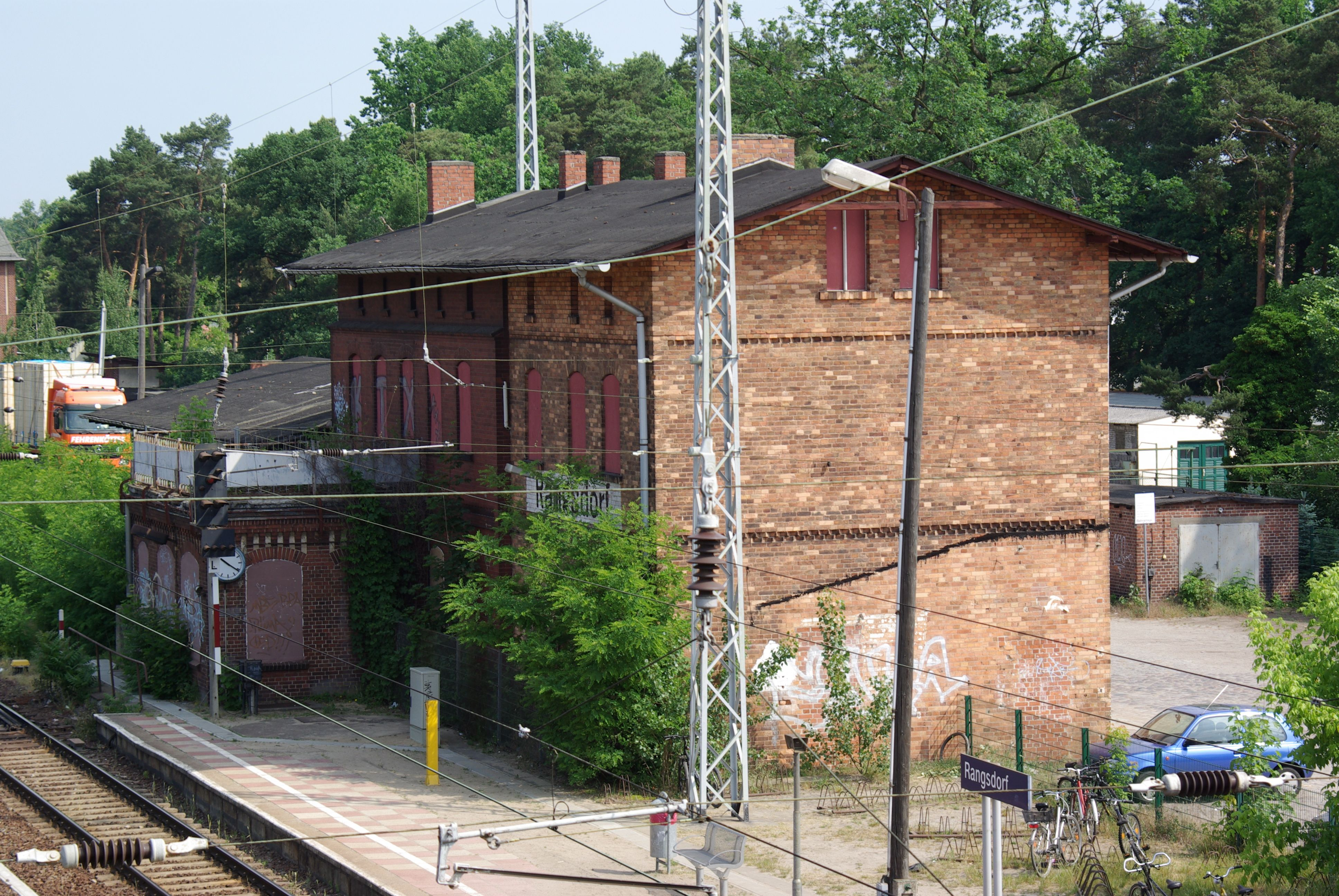 Rangsdorf in Brandenburg. Das Bahnhofsgebäude wird heute aber nicht mehr genutzt. Das Foto wurde von der Bahnbrücke aus gemacht.